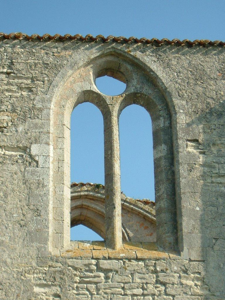 Abbaye Notre Dame de Ré dite des Châteliers : fenêtre de la nef (La Flotte, Ile de Ré, Charente Maritime, France)